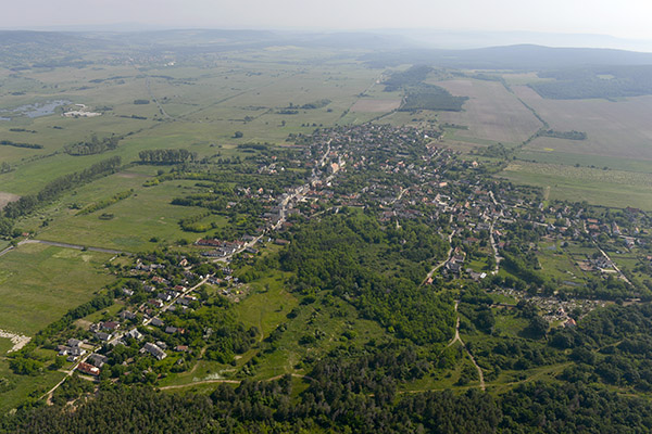 Kővágóörs látképe madártávlatból